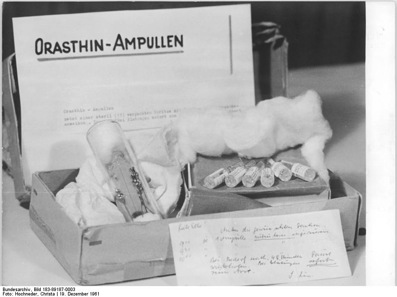 Zentralbild Hochneder 21.12.1961 Medikamentenschmuggel in Weihnachtssendungen Eine Dokumentation der Unmenschlichkeit und des Verbrechens stellt eine Ausstellung des Amtes für Zoll und Kontrolle des Warenverkehrs dar, die am 19.12.61 vor Pressevertretern im Ministerium für Gesundheitswesen in Berlin eröffnet wurde. Vom Abtreibungsmittel in der Zigarettenpackung bis zum Contergan im Bonbonpapier, vom gefährlichen Antibiotikum in der aufgeschnittenen Marzipanfigur bis zum stark arsenhaldigen Präparat in der Schachtel einer Mattcreme sind hier Beweise angehäuft, die das Ausmaß der Gefahr kennzeichnen, die die Bevölkerung der DDR durch den Medikamentenschmuggel aus Westberlin ausgesetzt wird. UBz: Abtreibungsmittel - Orasthin-Ampullen schickte "eine liebe Bekannte"